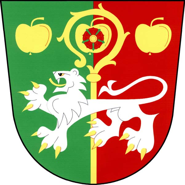 Znak obce Soběnov